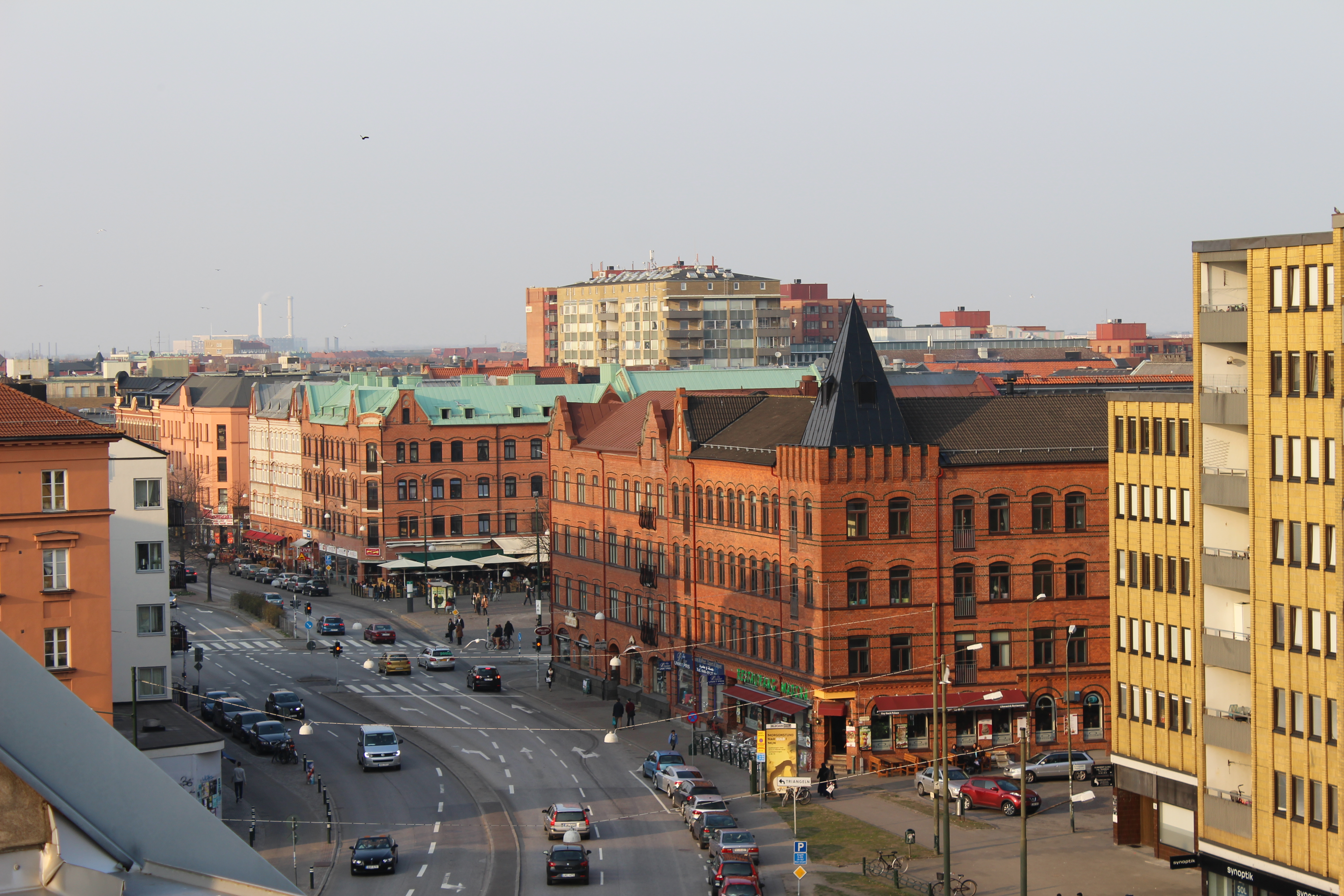 Utsikt över Möllevången i Malmö.